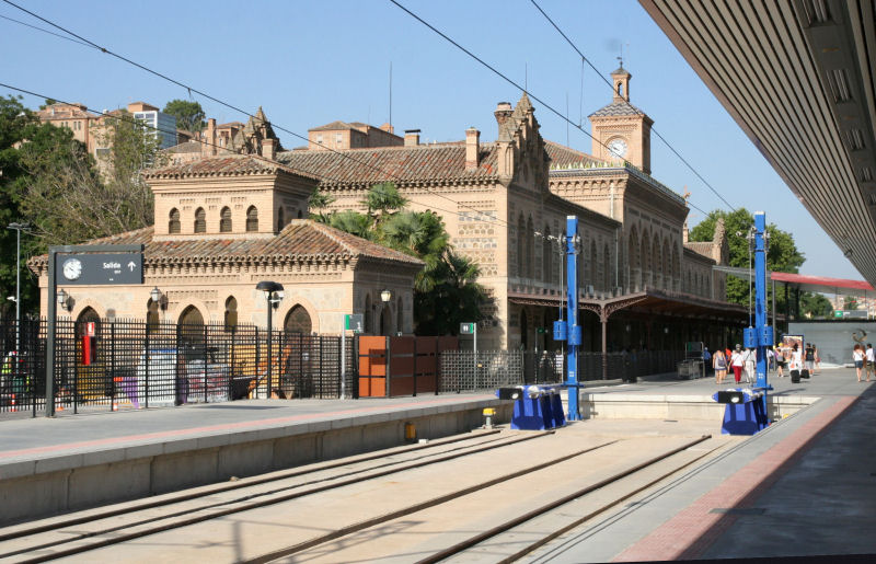 Estación de Toledo de la línea 020 de Adif de La Sagra a Toledo (Castilla - La Mancha).